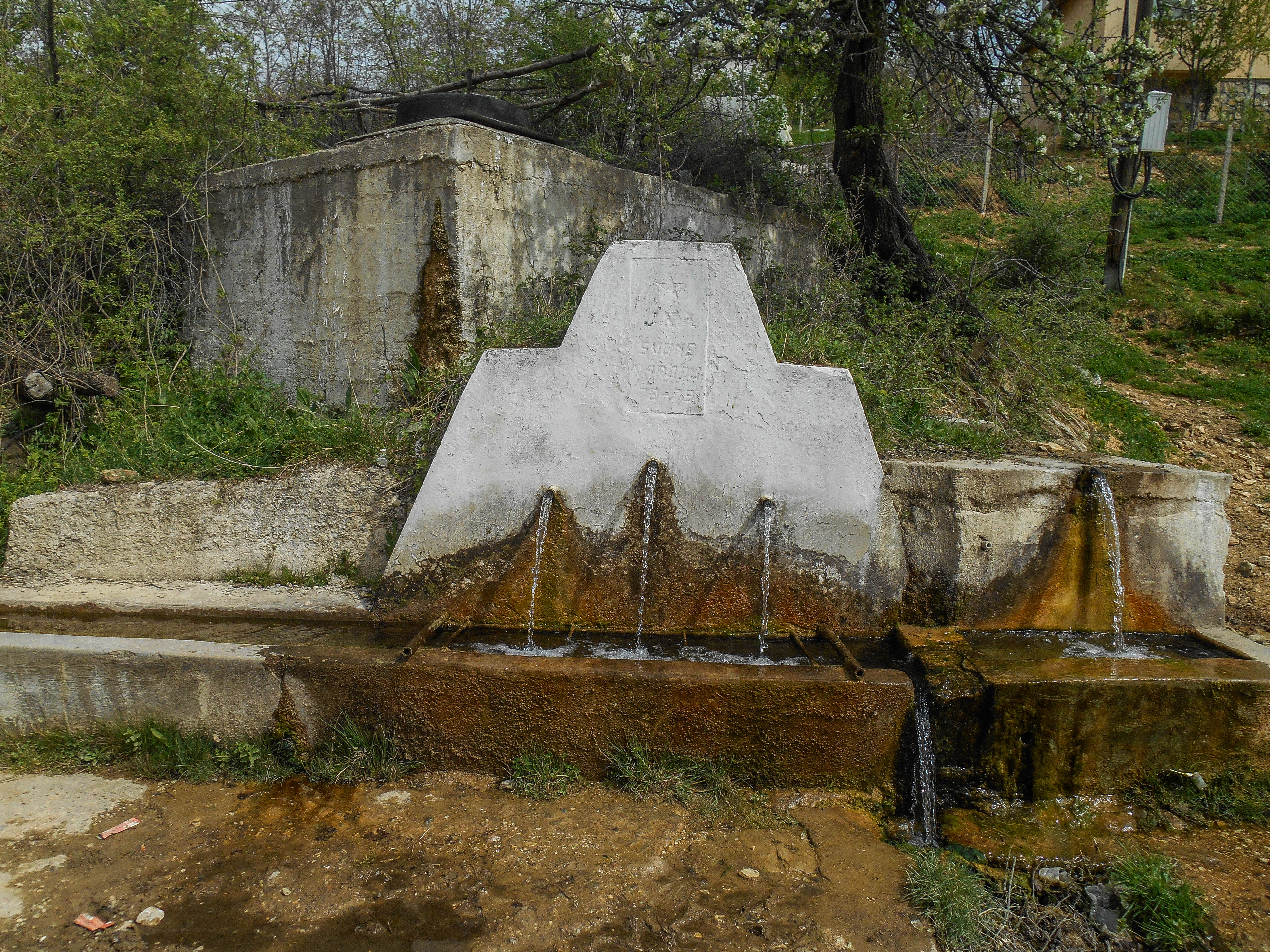 Селска чешма